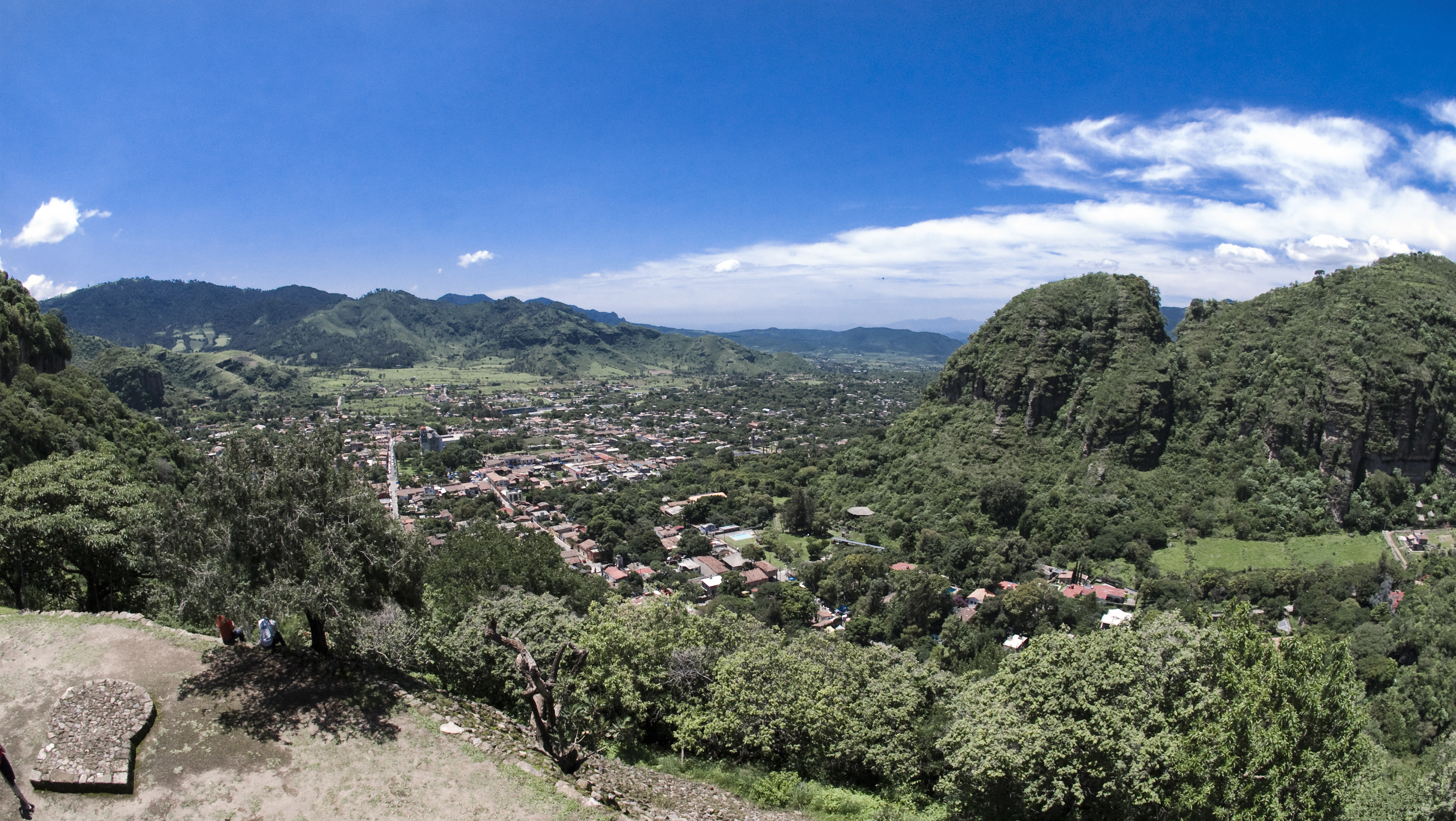 ¿Y para qué? ¿Para qué tanto cielo, para qué tanto mar? ¿De qué sirve esta ola que se rompe y el viento de la tarde? ¿De qué sirve la tarde, paisaje inútil? Puede ser que ya nunca vengas. Que nunca regreses. ¿De qué sirven las flores que nacen en los caminos? Si mi camino, solitario, es nada. Nada. Mas, pra quê? Pra que tanto céu Pra que tanto mar, pra quê? De que serve esta onda que quebra E o vento da tarde? De que serve a tarde, inúltil paisagem? Pode ser que não venhas mais Que não venhas nunca mais De que servem as flores que nascem pelos caminhos Se o meu caminho, sozinho, é nada. Esta rolita, en la versión de Elis Regina y Antonio Carlos Jobim ME MATA.